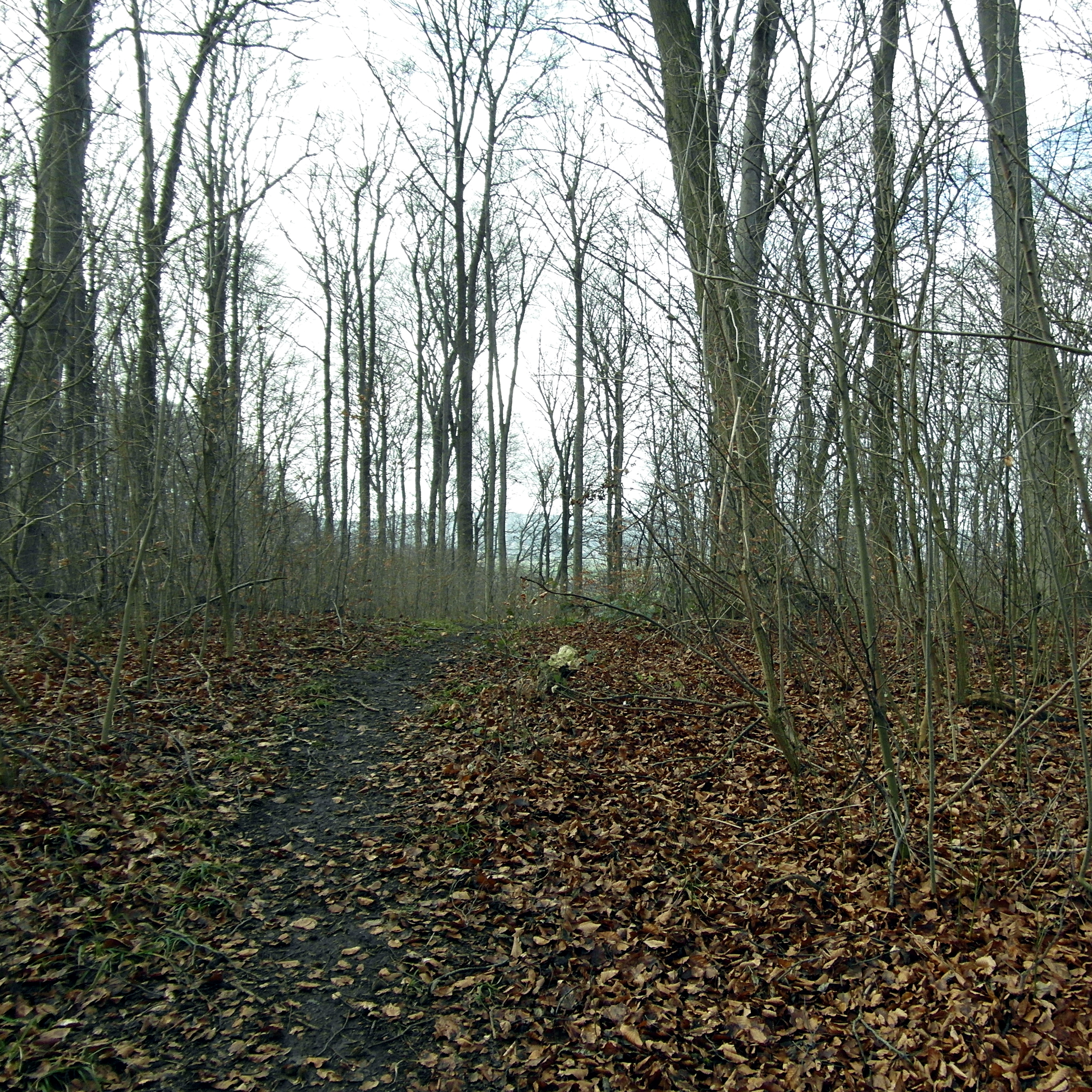 Blick über den Gipfel des Köthnerberg im Gehrdener Berg in der Region Hannover in Niedersachsen. Im Hintergrund der westliche Deister.